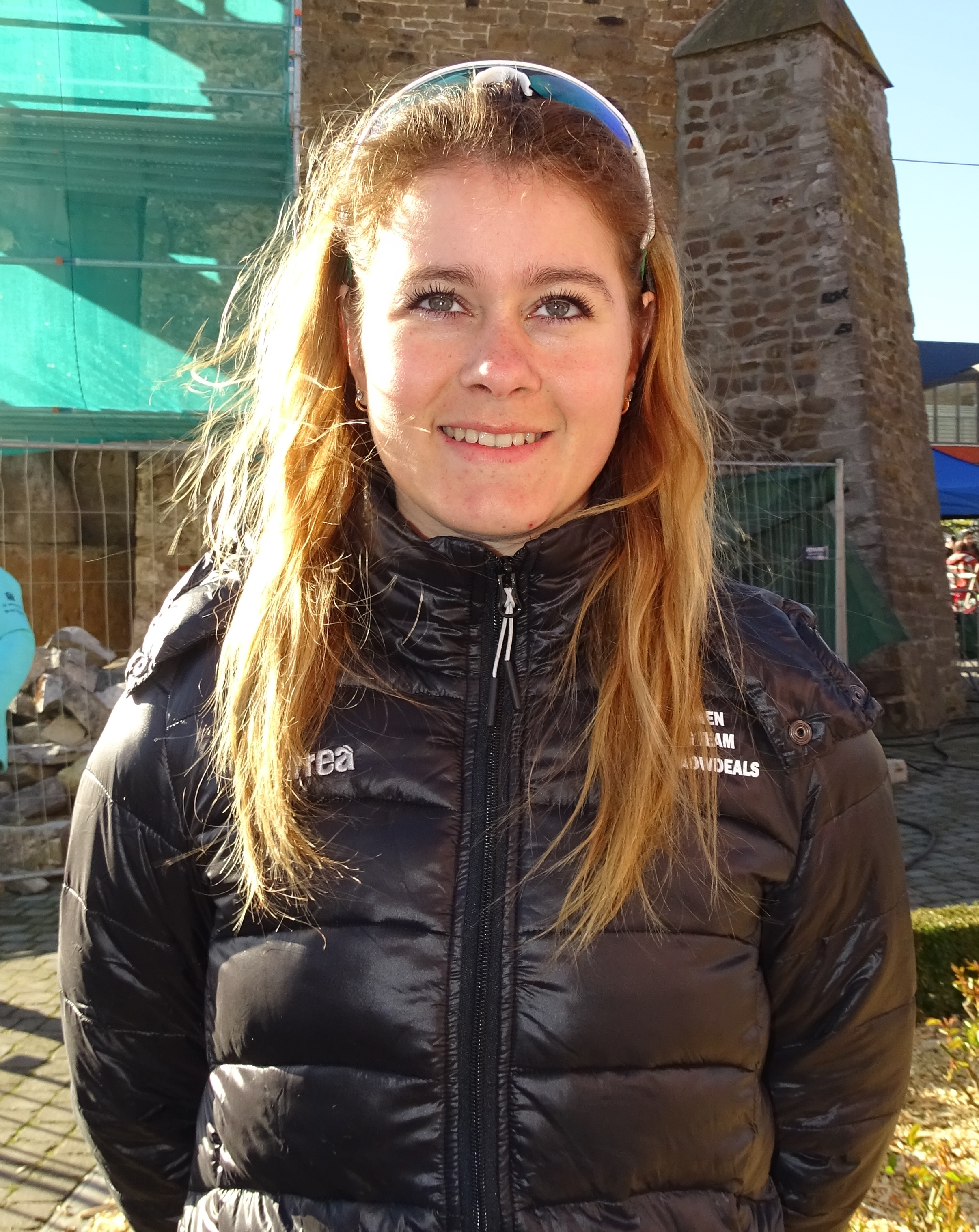 Reportage réalisé le mercredi 2 mars à l'occasion du départ du Samyn des Dames 2016 et du Samyn 2016 à Quaregnon, Belgique.